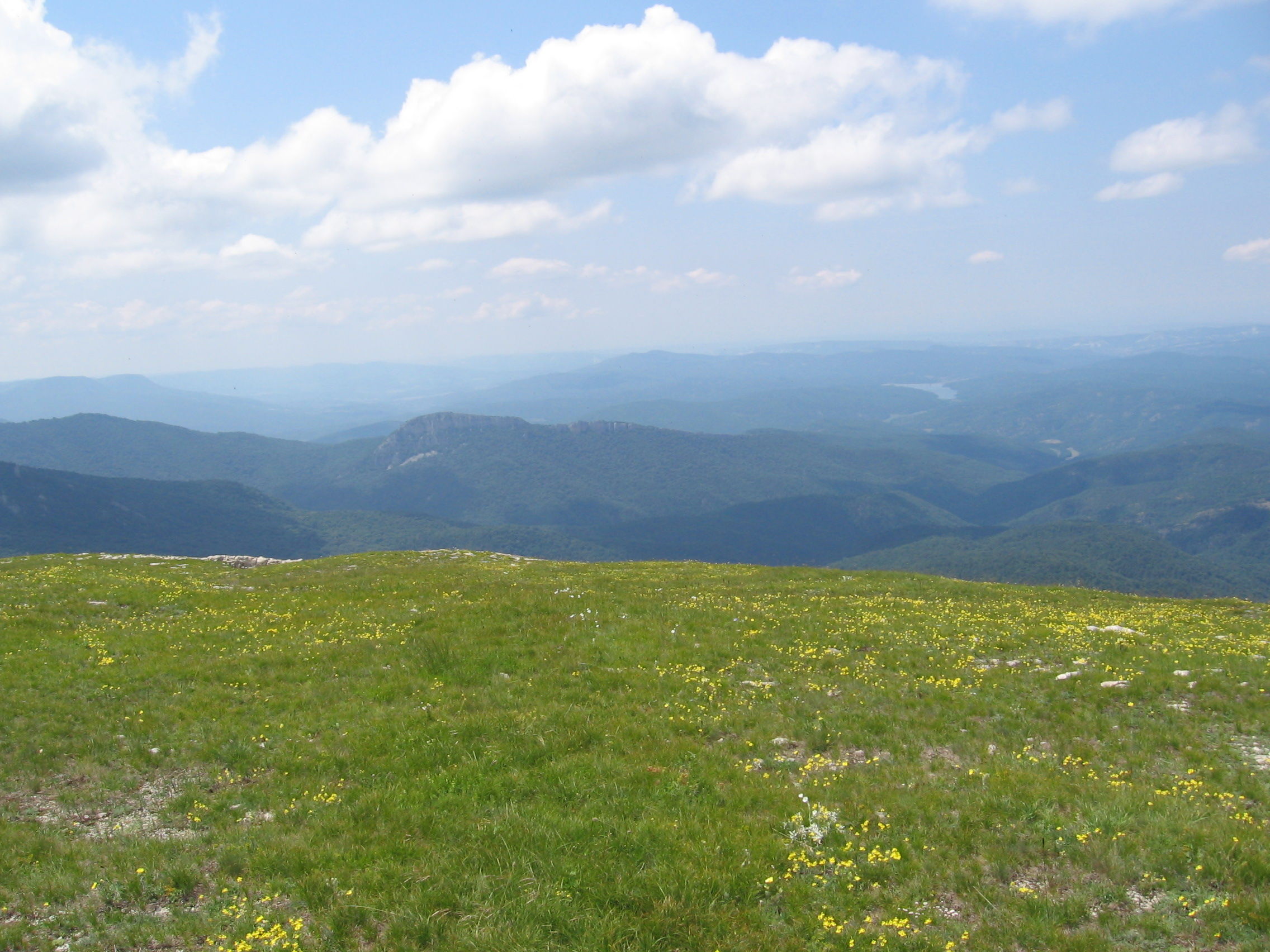 Фото